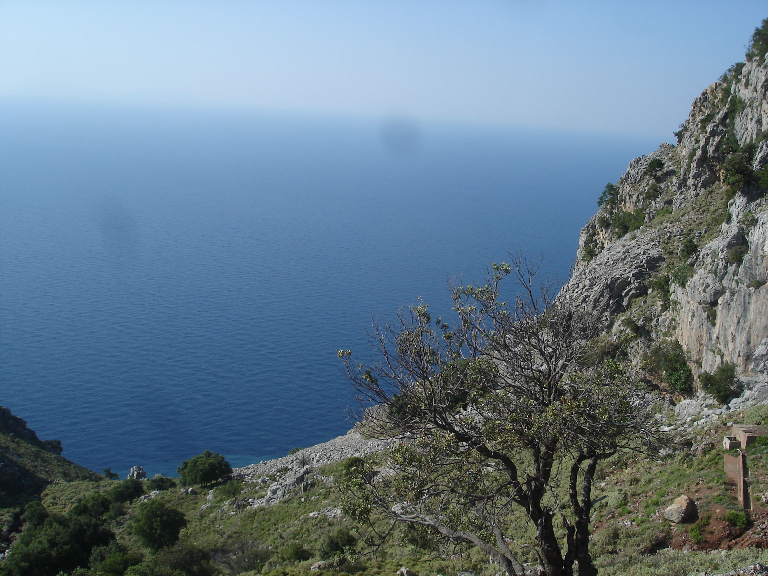 Cotes et vue sur la mer Egée, entre Chiladou Beach et le cap Apothikes sur l'ile d'Eubée (Greece)